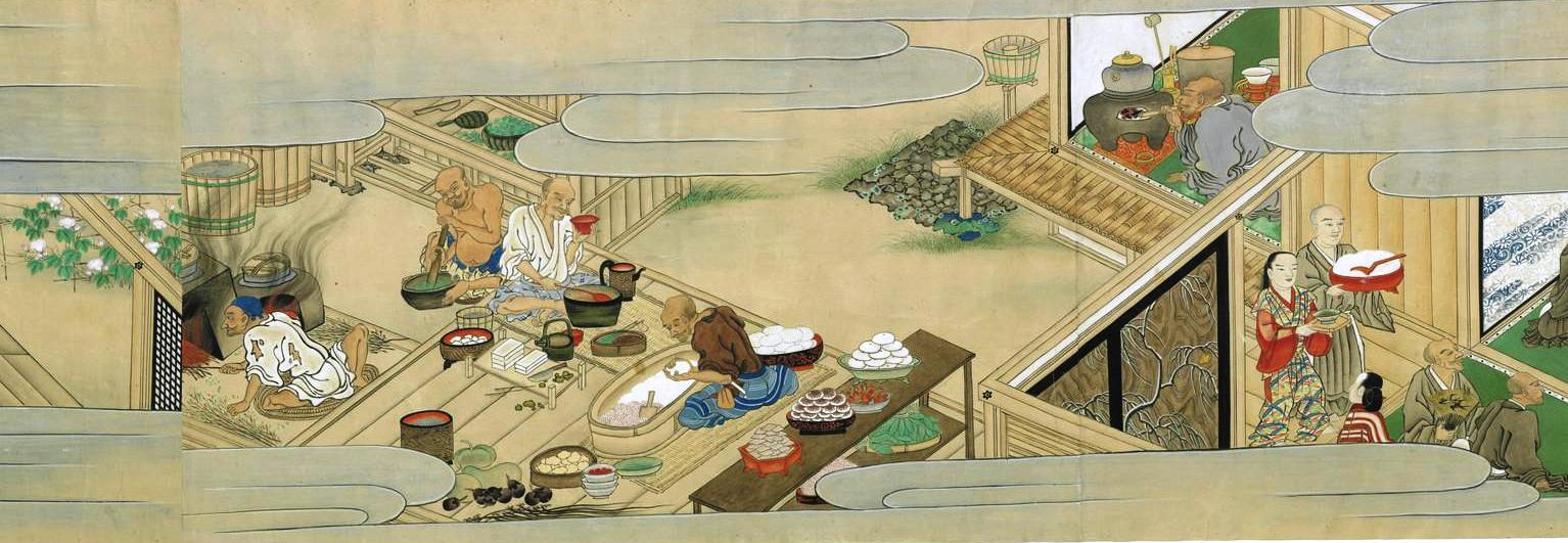 酒飯論絵巻(狩野元信筆)の江戸時代の模本。原本は室町時代の作。